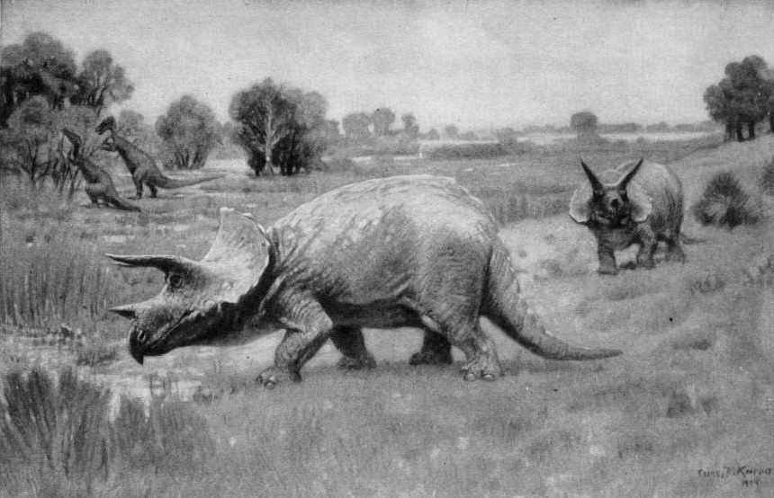 Triceratops